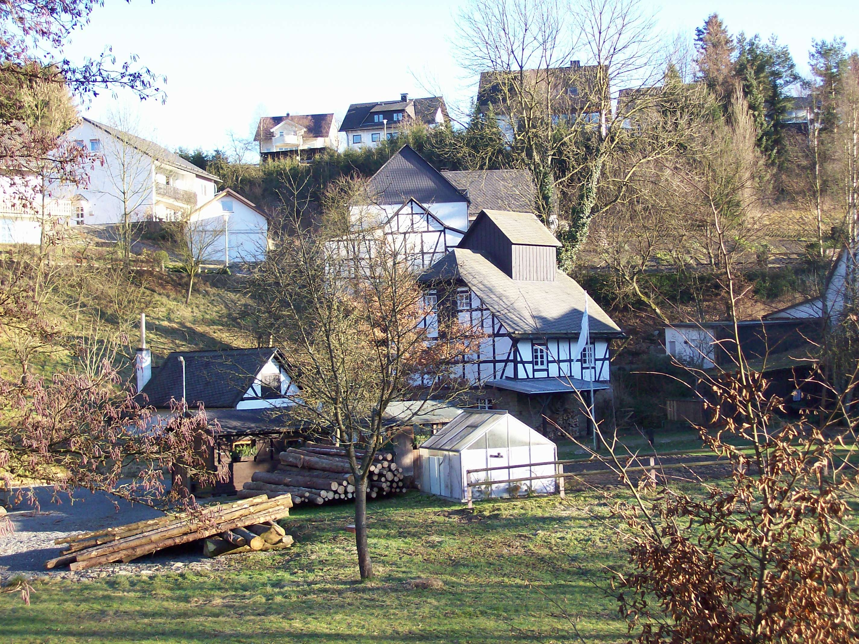 Alte Mühle in Eslohe-Cobbenrode (Germany)